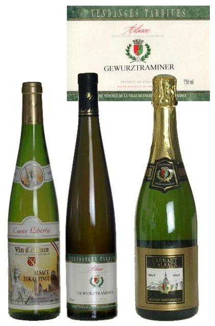 Un petit aperçu des vins et du crémant du domaine viticole de la ville de Colmar